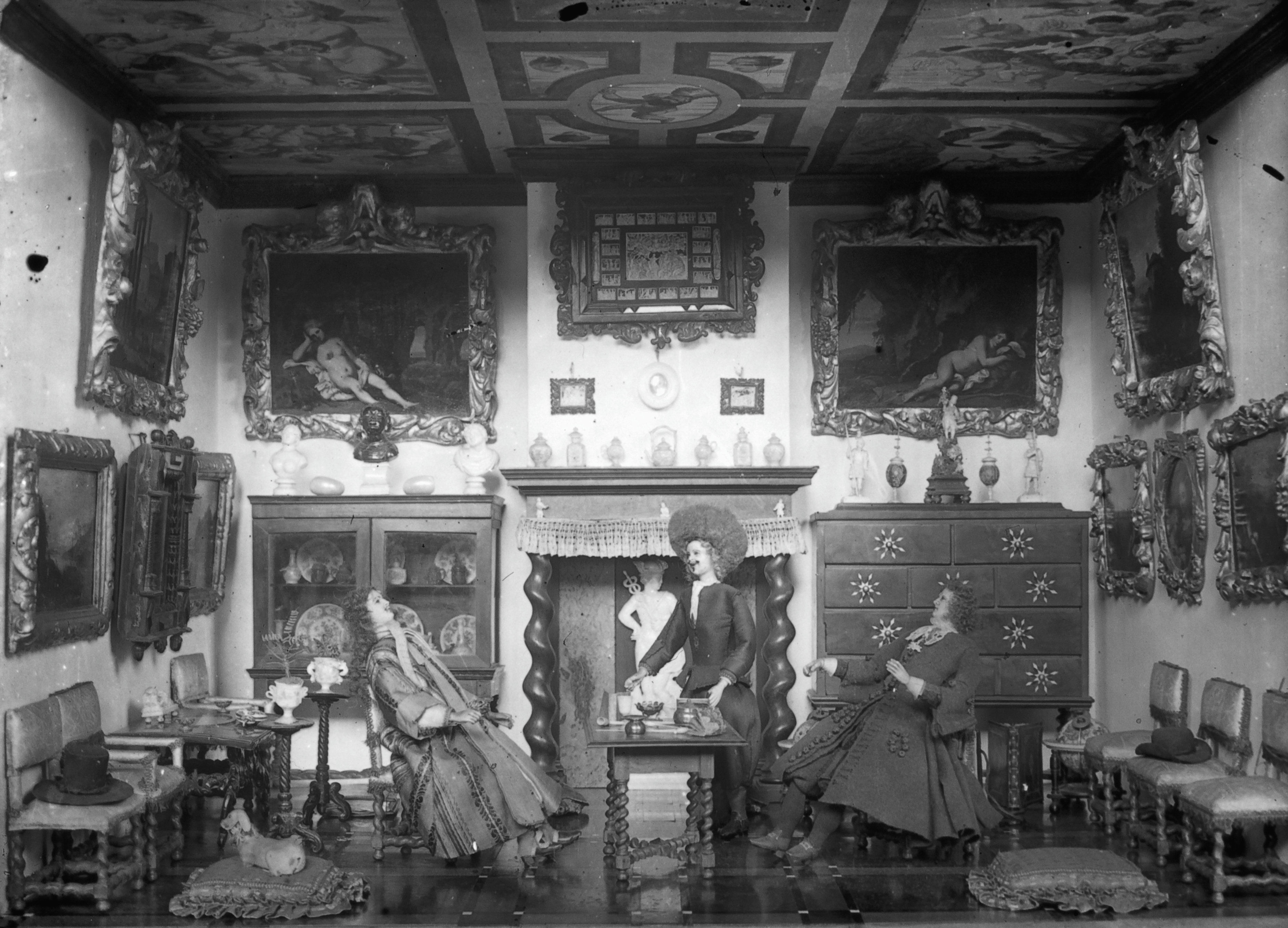 Poppenhuis Van Petronella De La Court: Salon in poppenhuis uit de collectie van het Centraal Museum